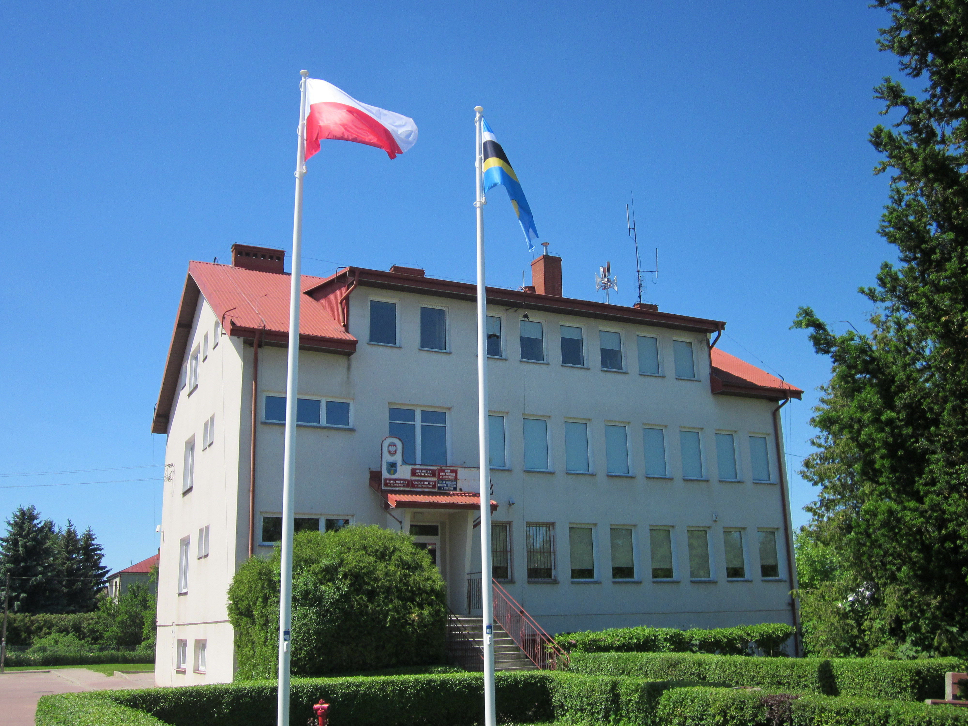 Urząd Miejski, ul. Główna 6. Otwarcie budynku biurowego nastąpiło 18 września 1977 r. W latach 1994–98 powiększono budynek poprzez nadbudówkę. ( W kwietniu 1945 r. przeniesiono Urząd Gminy Szepietowo z Dąbrowy Wielkiej na st. Szepietowo).